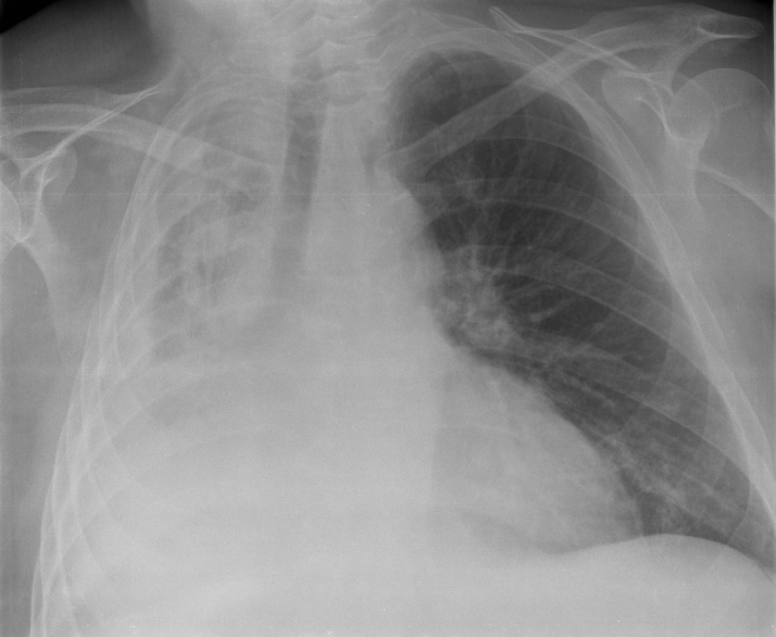 Radiografía simple digital de tórax de un paciente con atelectasia del pulmón derecho, realizada en Abril de 2005, en el Instituto Valenciano de Oncología. Categoría:Medicina (imagen)